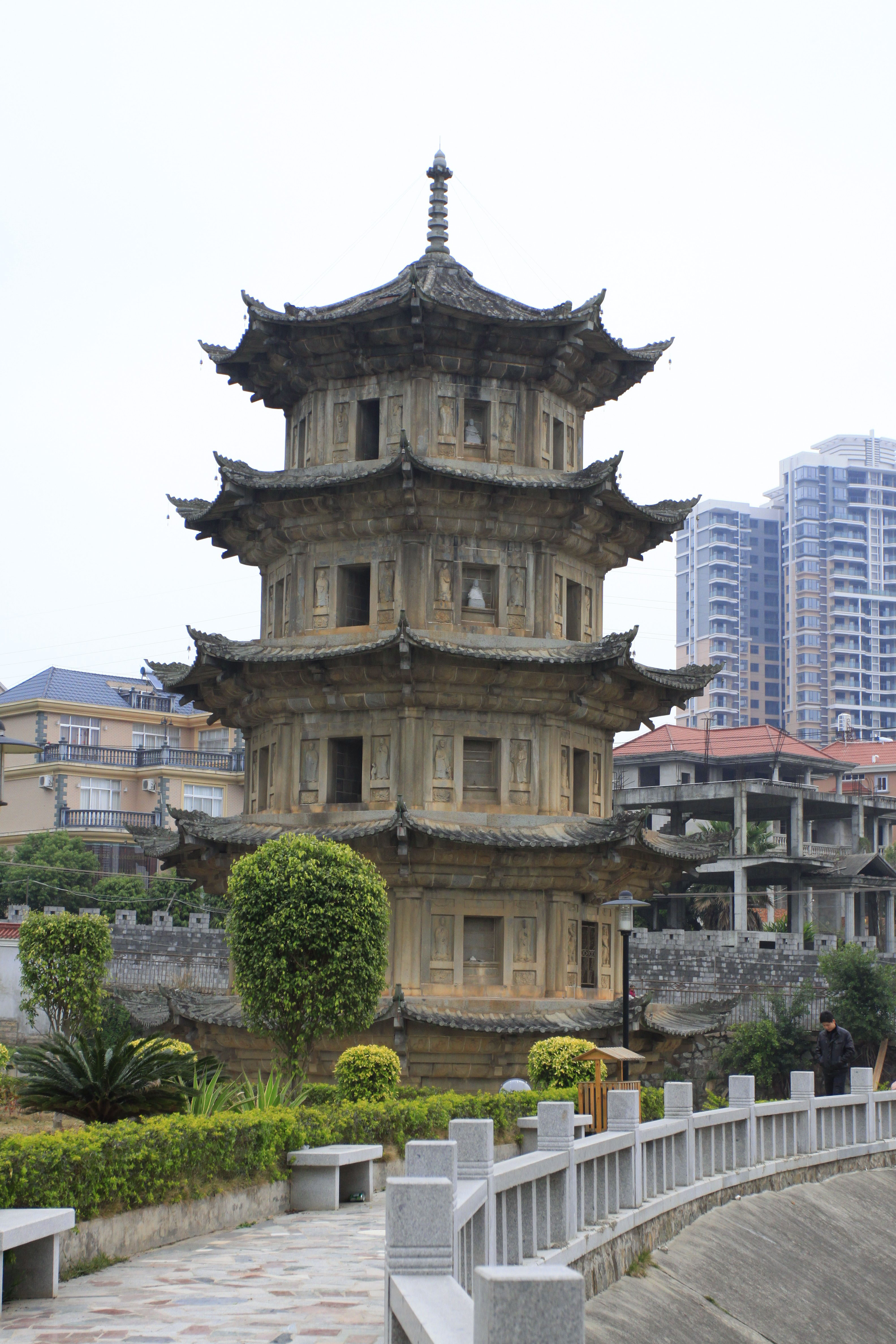 广化寺释迦文佛塔，位于中国福建省莆田市，是全国重点文物保护单位。